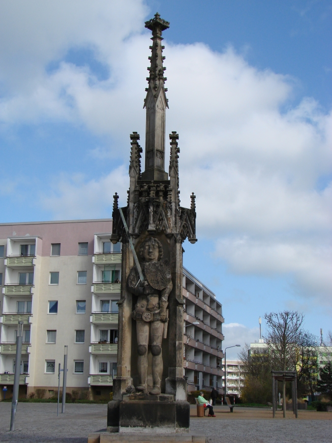 Gesamte Rolandstatue auf dem Markt. Im Hintergrund Neubauten